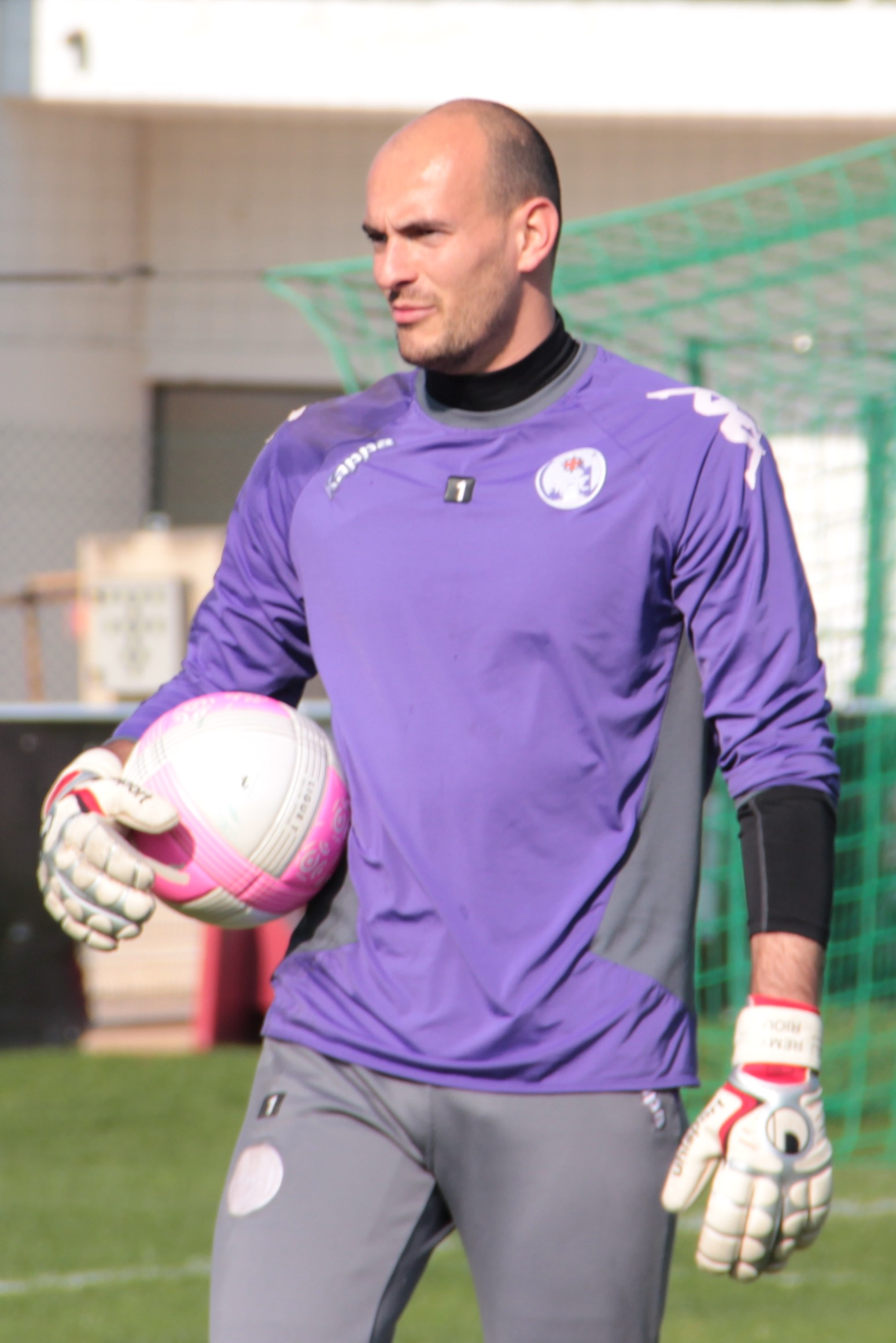 Rémy Riou à l'entraînement du Toulouse Football Club.